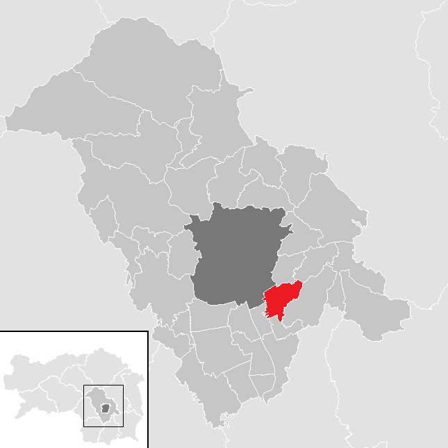 Lage von Raaba-Grambach im Bezirk Graz-Umgebung